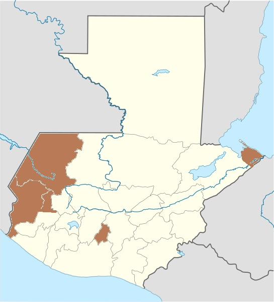 Mapa aproximado de las doctrinas a cargo de la orden de los Mercedarios en Guatemala durante la época colonial (1540-1754)